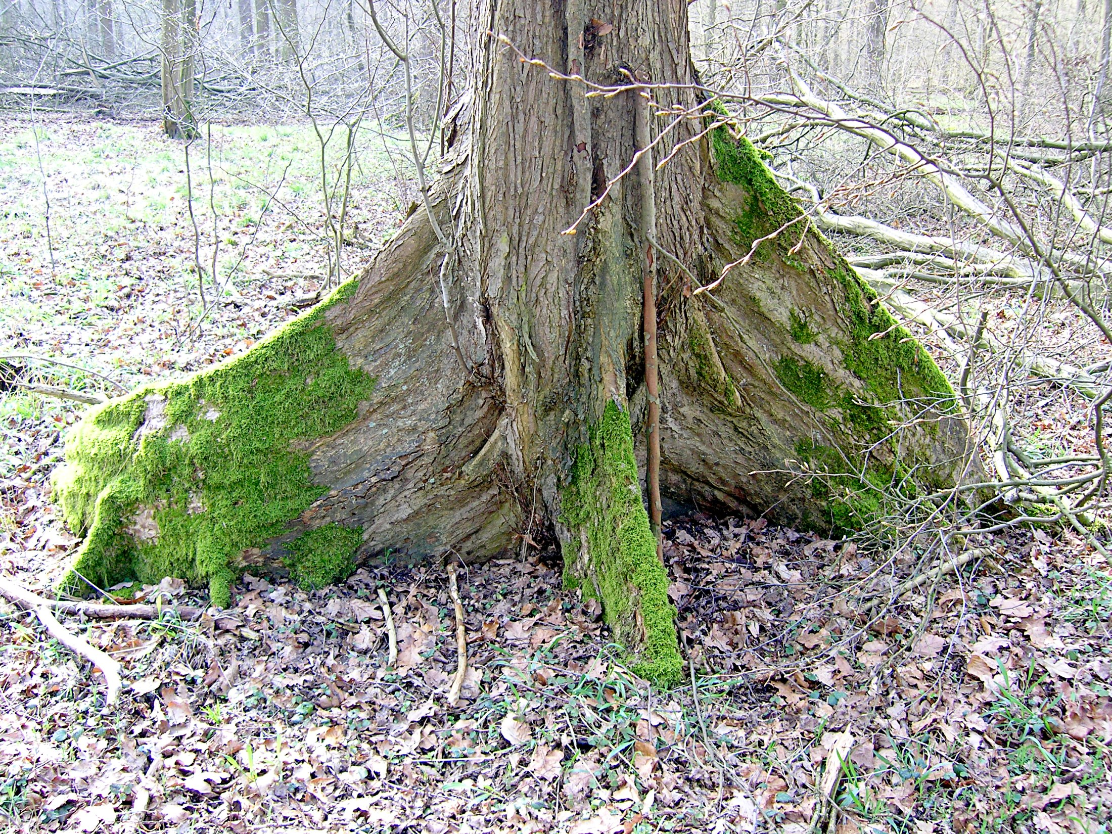 Brettwurzel einer Ulme Quelle: Veröffentlicht auch bei Ex :: Natura, dem freien Portal für Umweltbildung: (Link zum Album) (unterliegt der GFDL) Fotograf: Guido Gerding